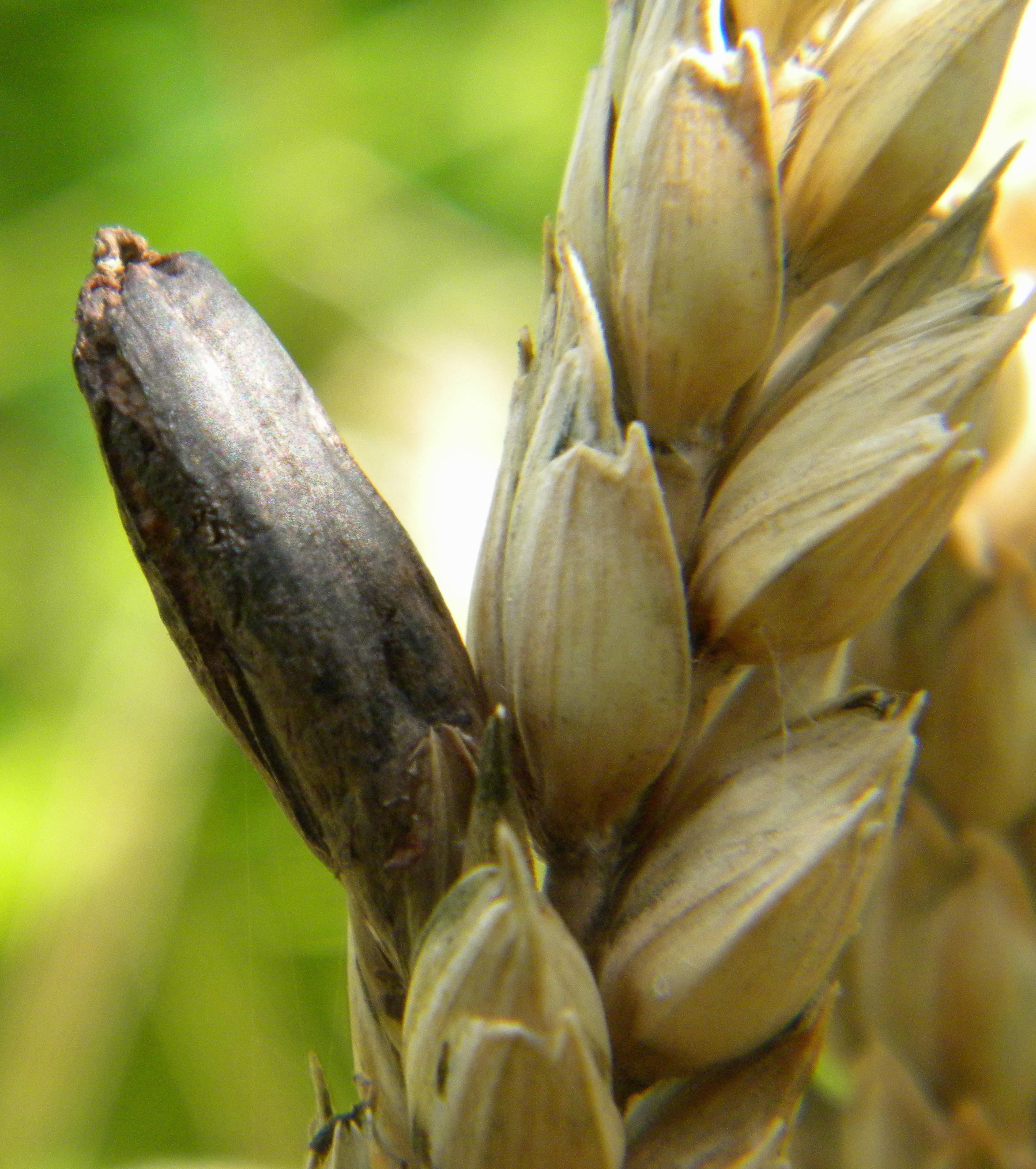 Ergot sur blé, Beaune (21)